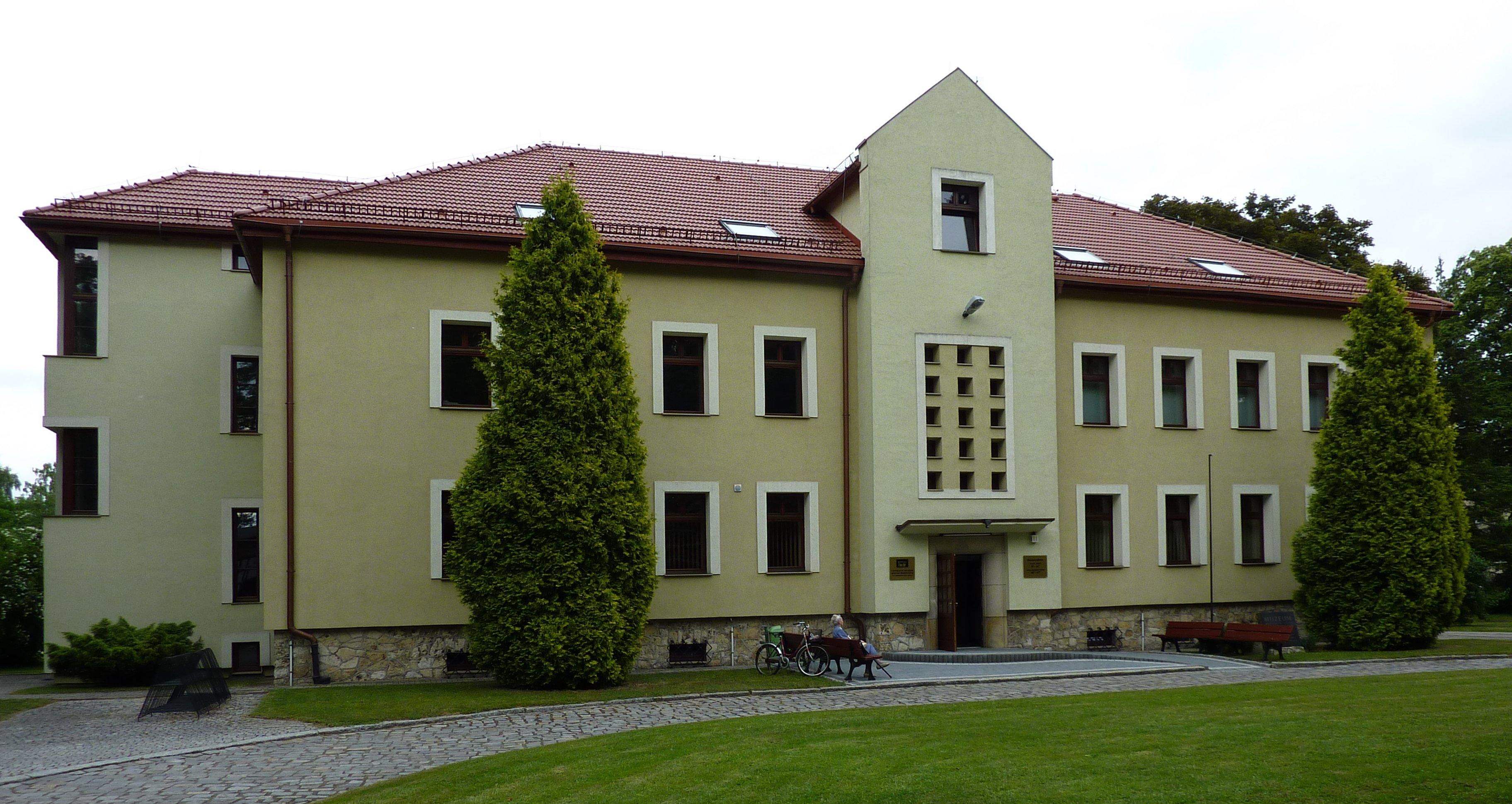 Centralne Muzeum Jeńców Wojennych w Łambinowicach-Opolu - Dział Oświatowo-Wystawienniczy oraz Dział Zbiorów i Konserwacji